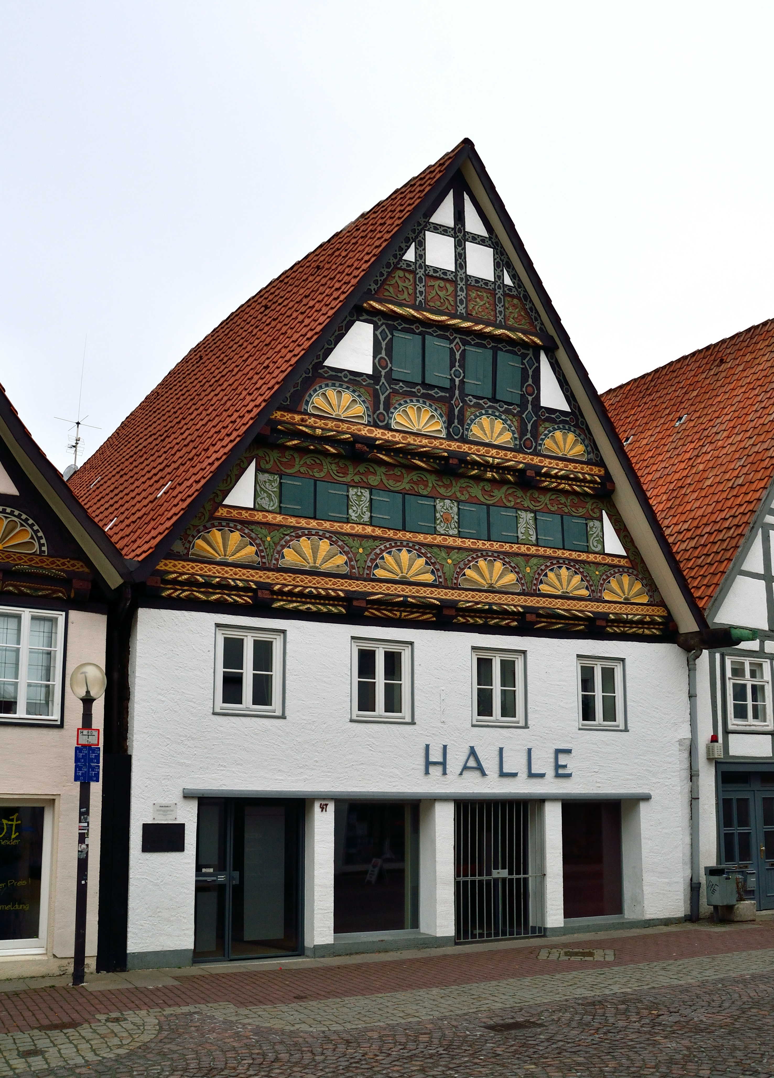 Fachwerkgiebelhaus in Lemgo, Geburtshaus von Heinrich Drake